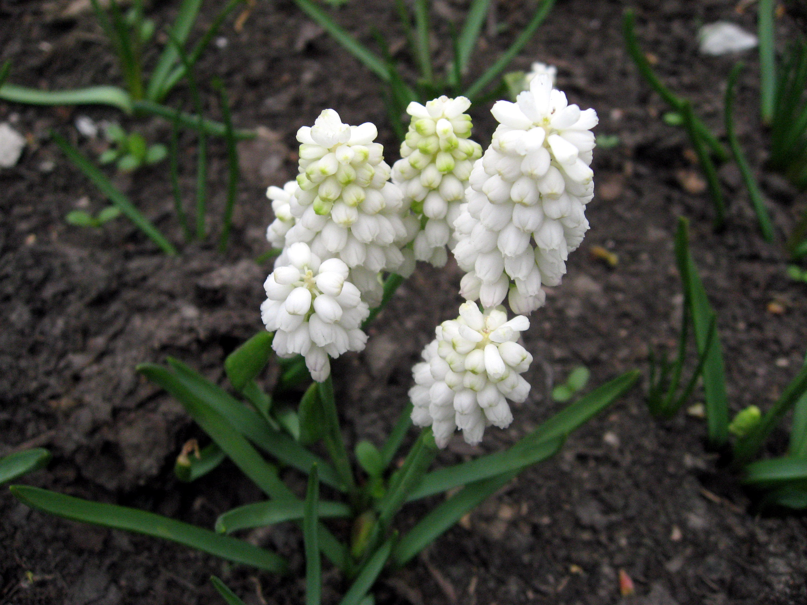 Modřenec, albinotický kultivar